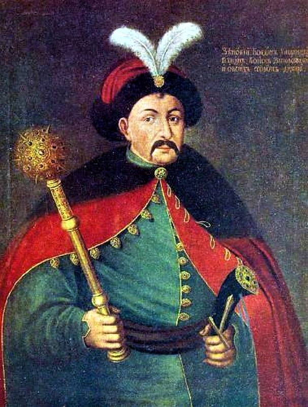 Портрет Богдана Хмельницького